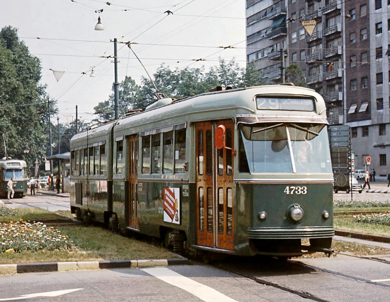 Vettura tranviaria 4733 dell'ATM di Milano, in livrea originaria a due toni di verde, ripresa in piazza della Repubblica